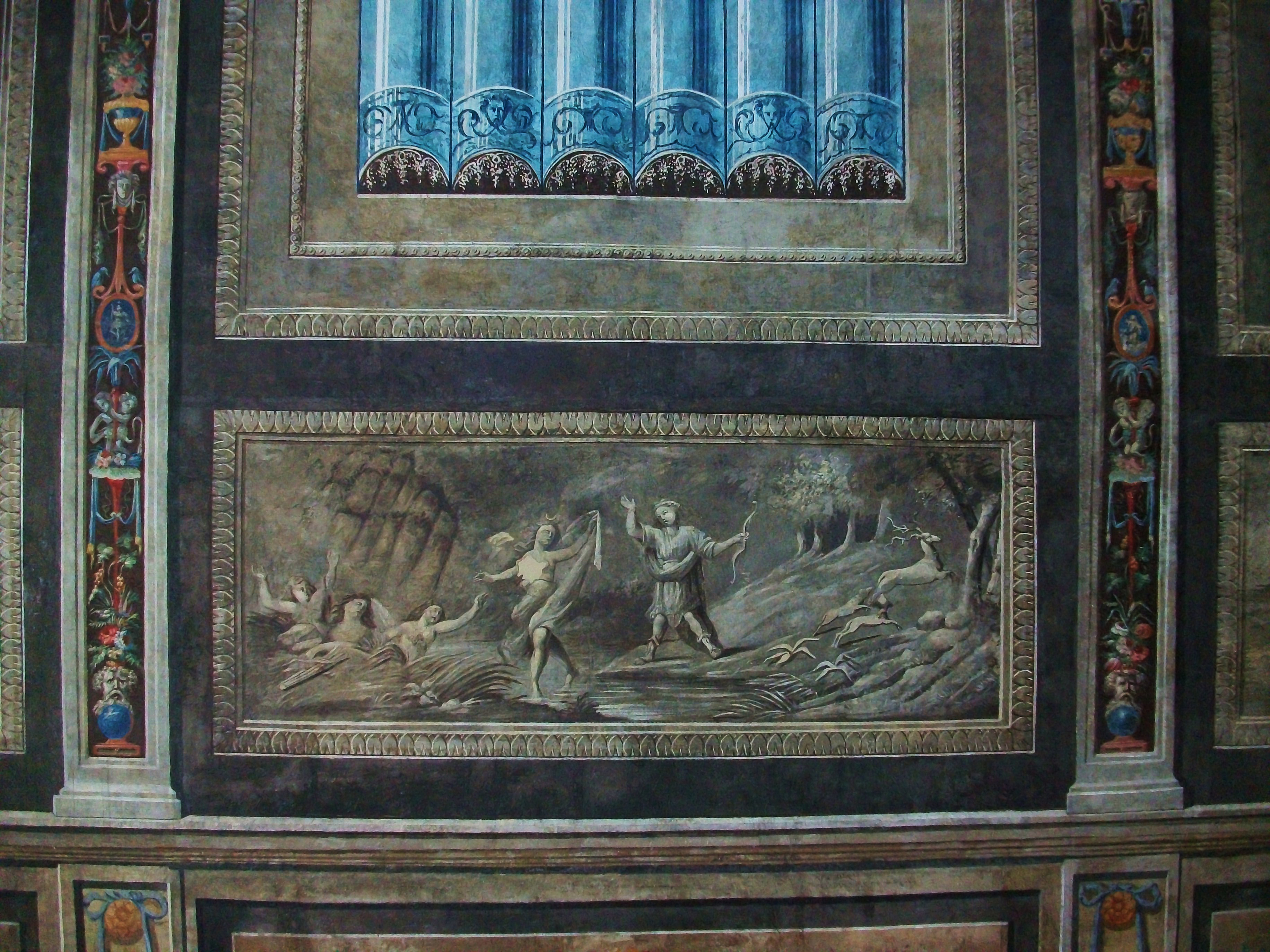 Pintures murals del Palau de Cervelló, València.